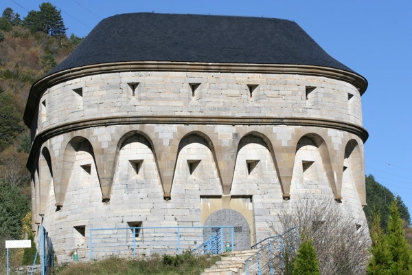 Antigua torre defensiva ubicada en el municipio de Canfranc Estación (Huesca)